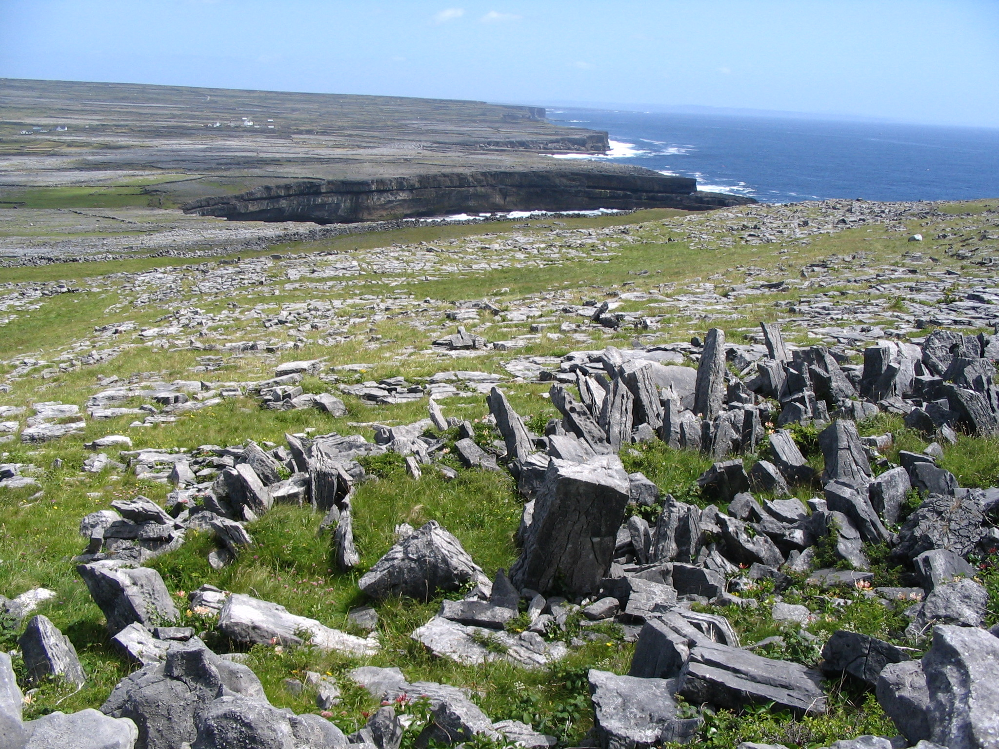 Iles Aran Inishmore depuis Dun Aengus